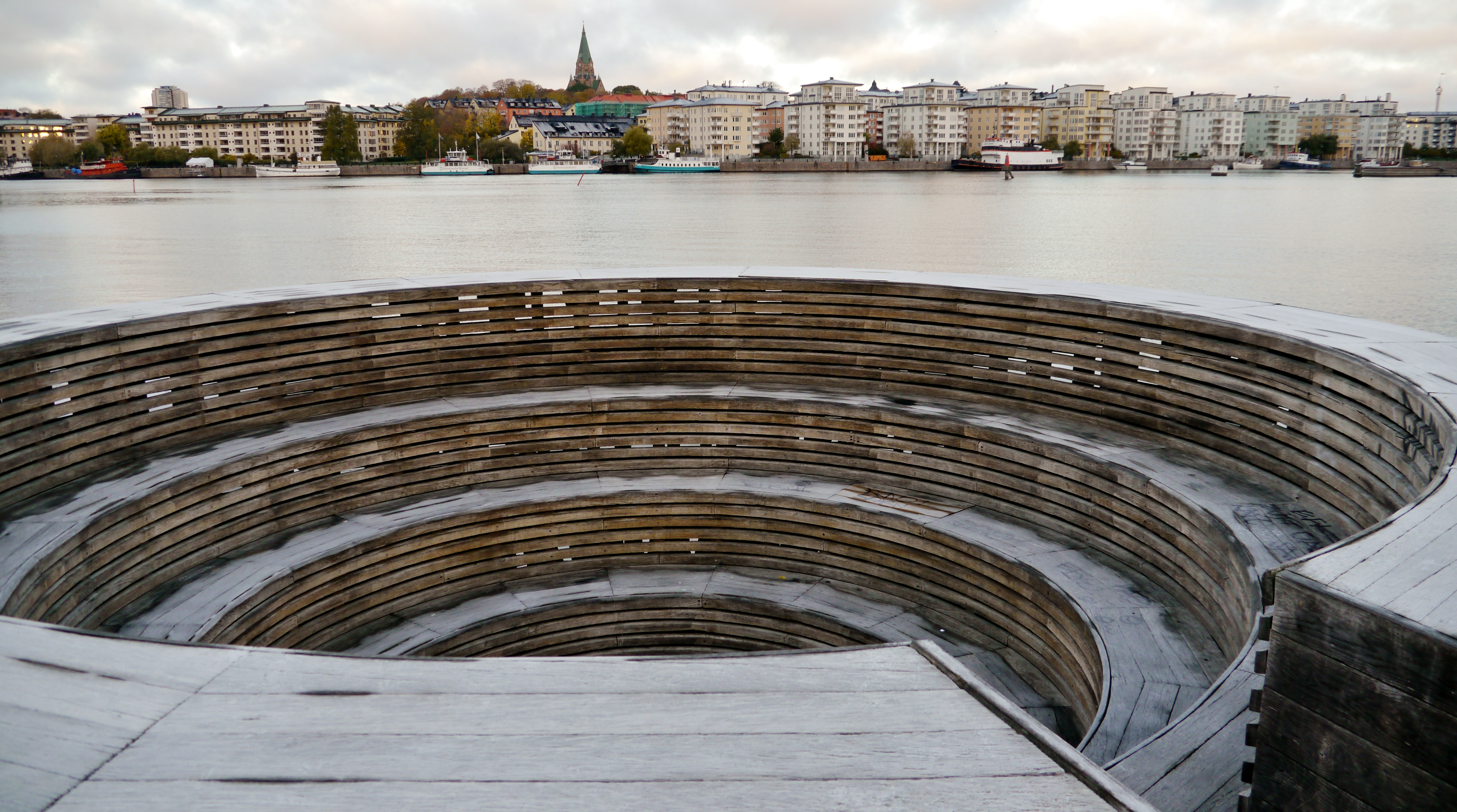 Gunilla Bandolins Observatorium, Hammarby sjöstad, Stockholm.